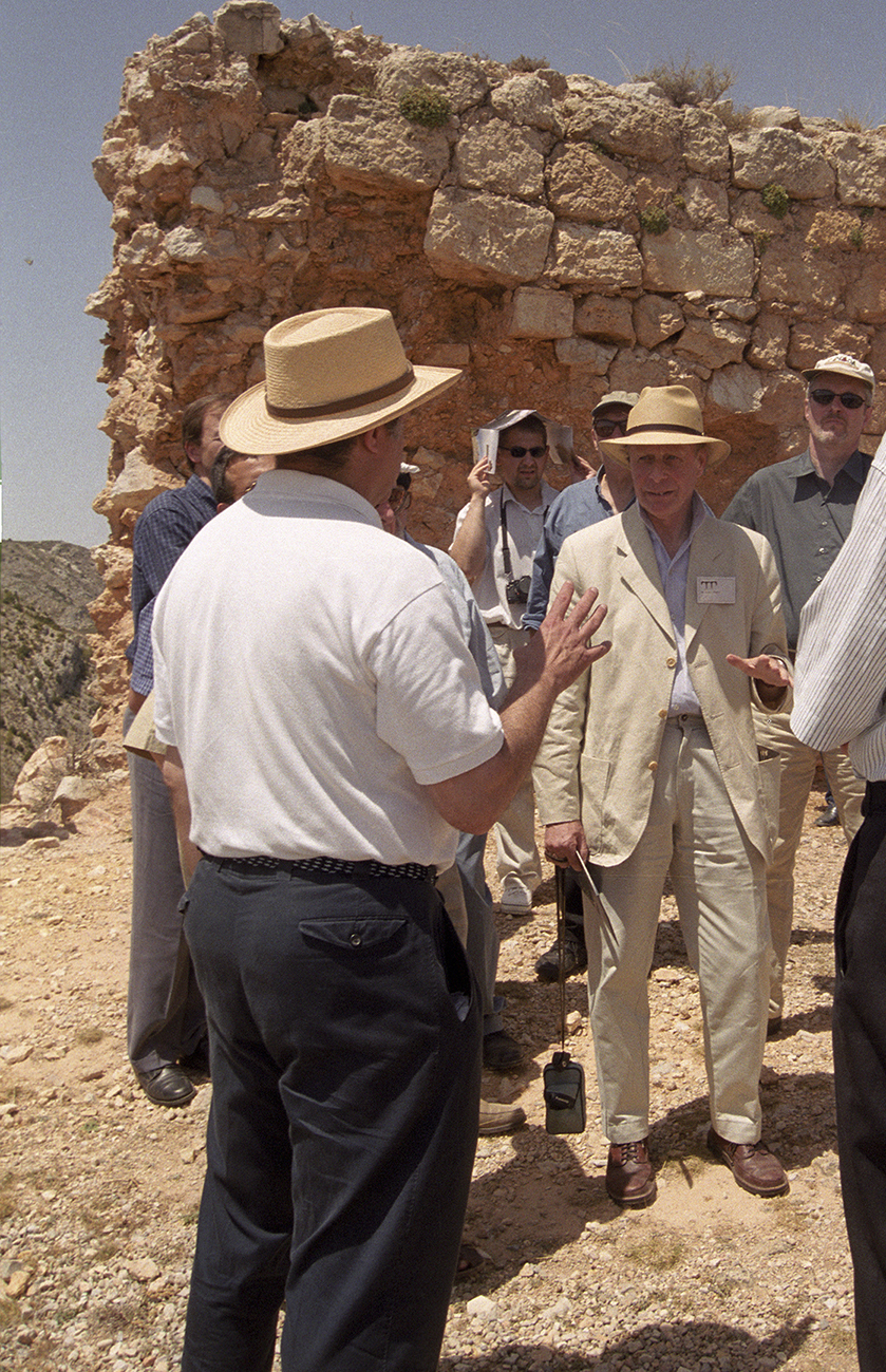 Alan Forey -en el centro de la foto- en una visita al castillo de Castellot (Teruel), durante un Congreso celebrado en 2001 en honor a S. Runciman.